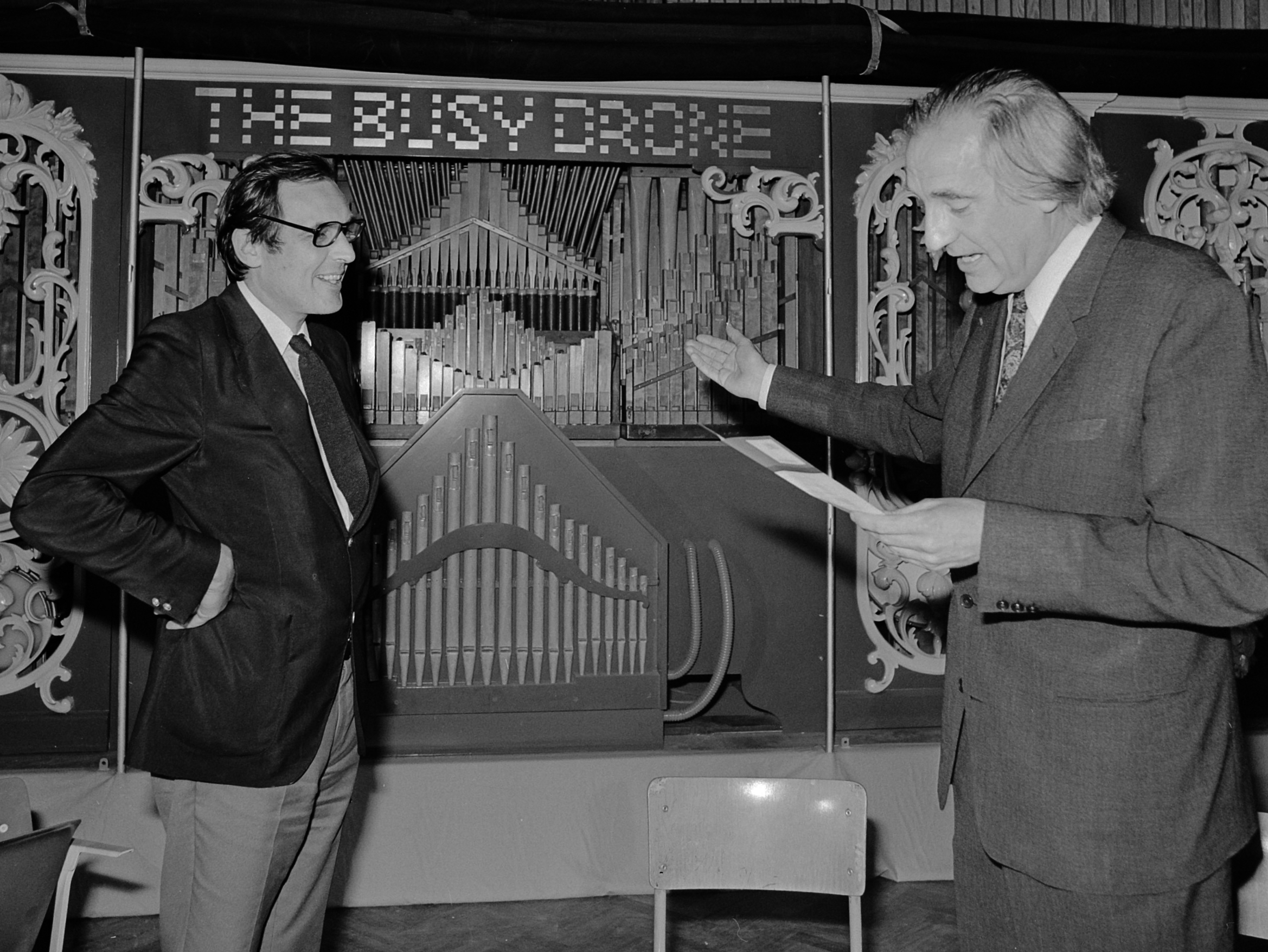 Orgel The Busy Drone in Stedelijk Museum overgedragen aan gemeente Amsterdam, Wethouder Lammers (links) en uitgever G. Lubberhuizen voor het orgel 18 juni 1973